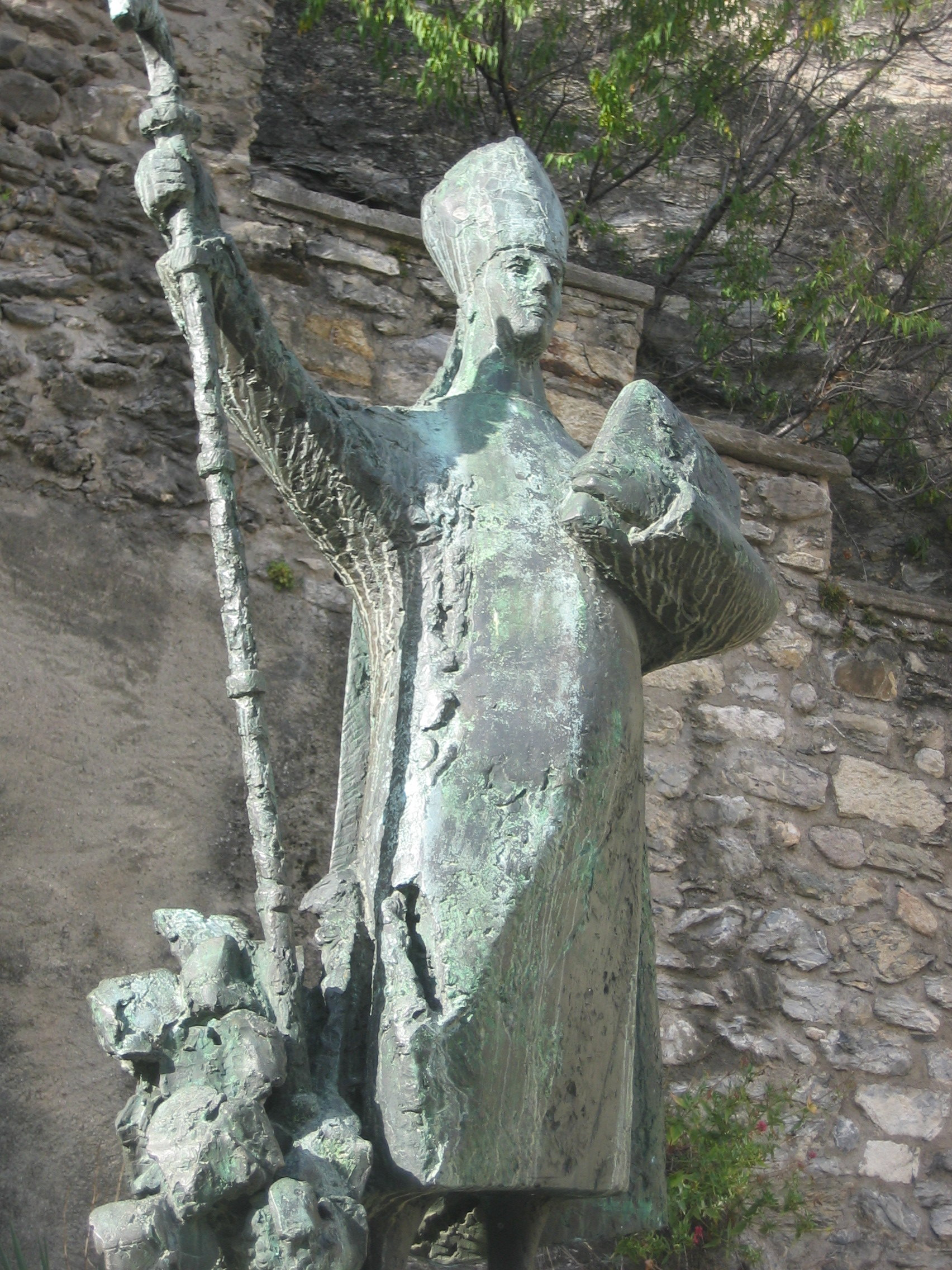 Statue de l'Evêque St-Théodule pour la Fontaine du même nom, Place de la Majorie, Sion (Valais, Suisse. Cette statue du premier évêque patron du pays, a été réalisée à l'occasion du 150e anniversaire de l'entrée du Valais dans la Confédération suisse, et est l'œuvre du sculpteur valaisan Jacques Barman, de Lausanne.